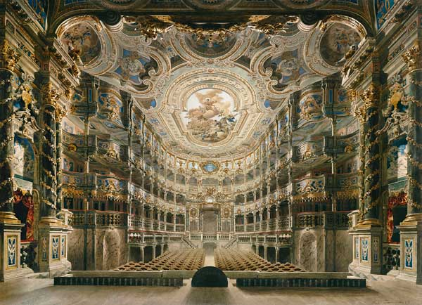 Innere Ansicht des Markgräflichen Opernhauses Bayreuth, 1879, Gouache, Theatermuseum München